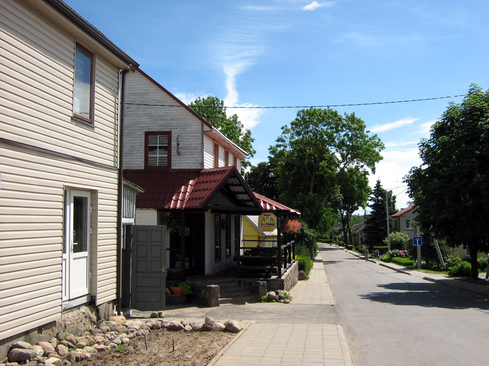 Plateliai Foto: Algirdas, 2007-06-15